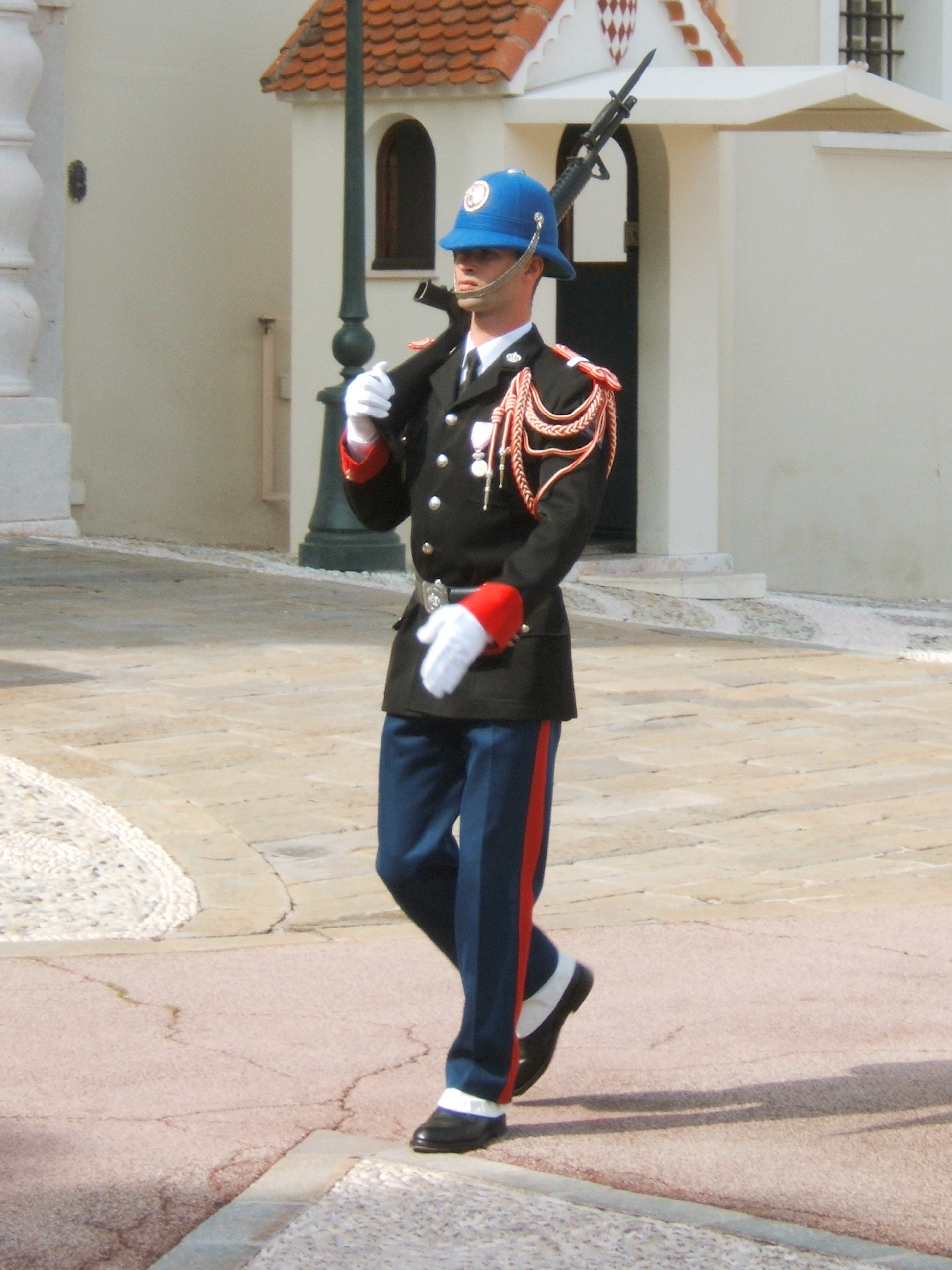 Un garde de la Compagnie des Carabiniers du Prince devant le Palais Princier de Monaco lors de la relève.